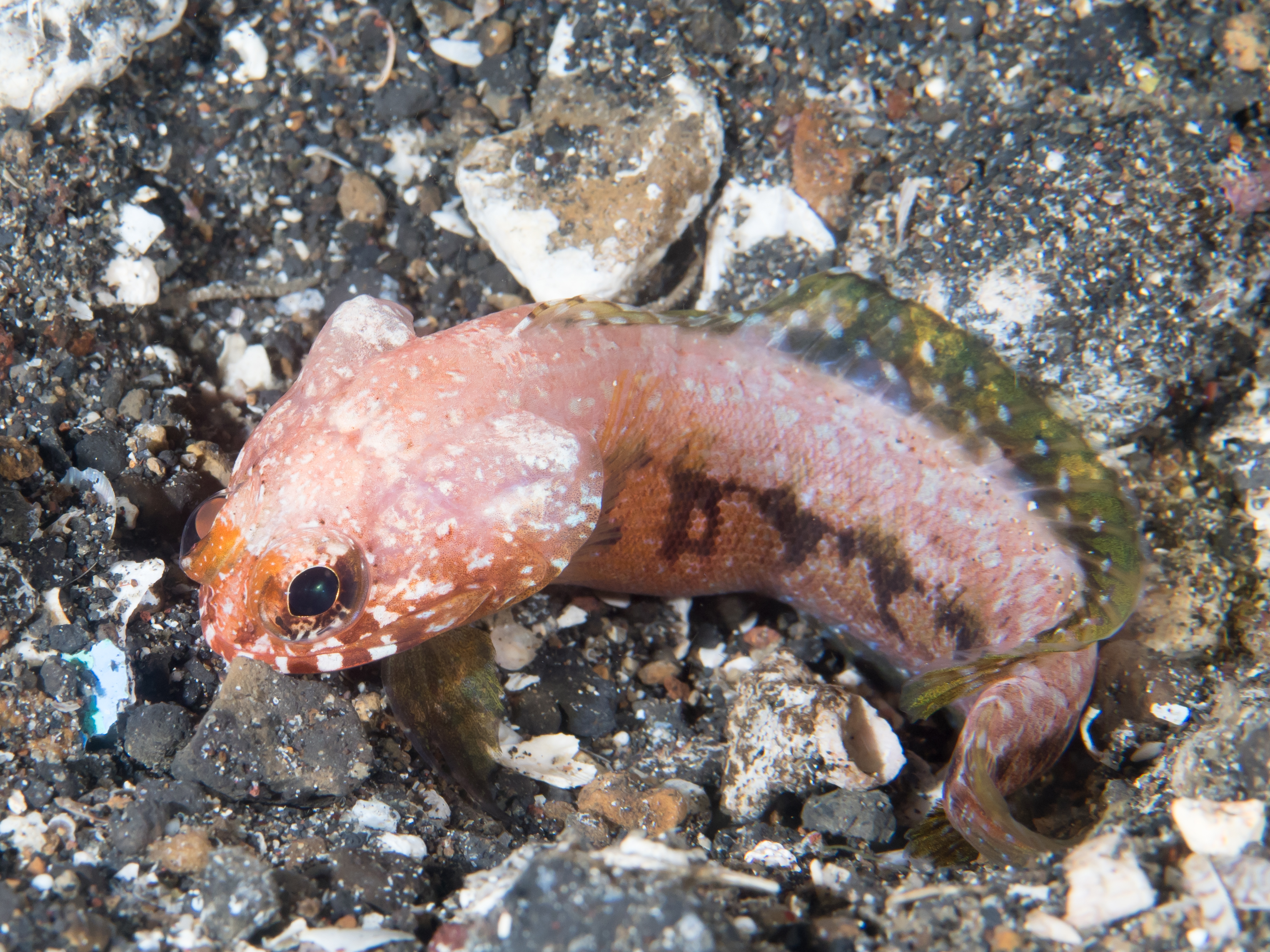 Lembeh, Indonesia - Jawfish (Stalix sp.)